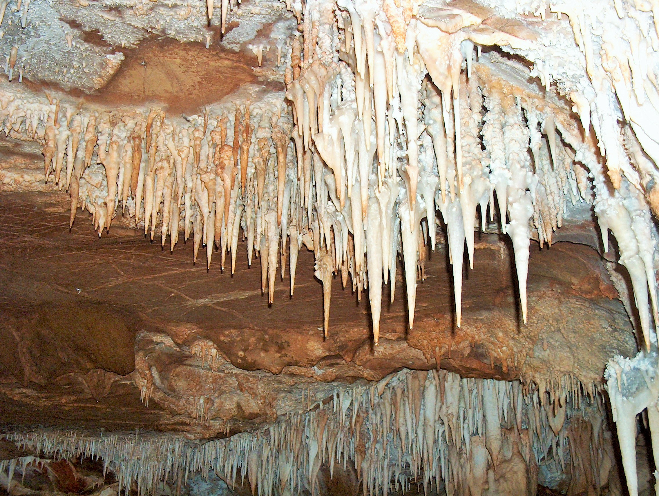 Cueva-2